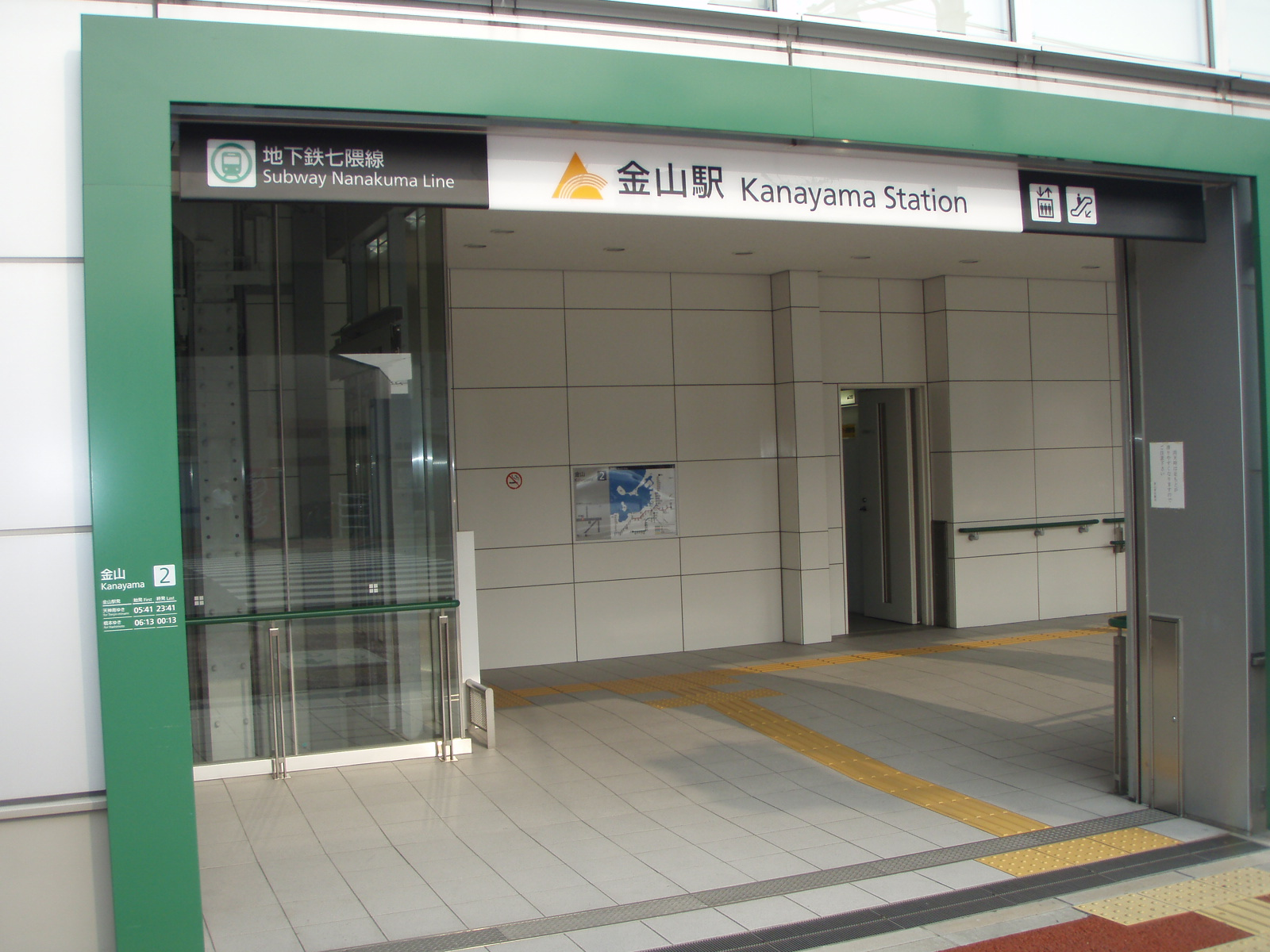 Kanayama station of Fukuoka City Subway